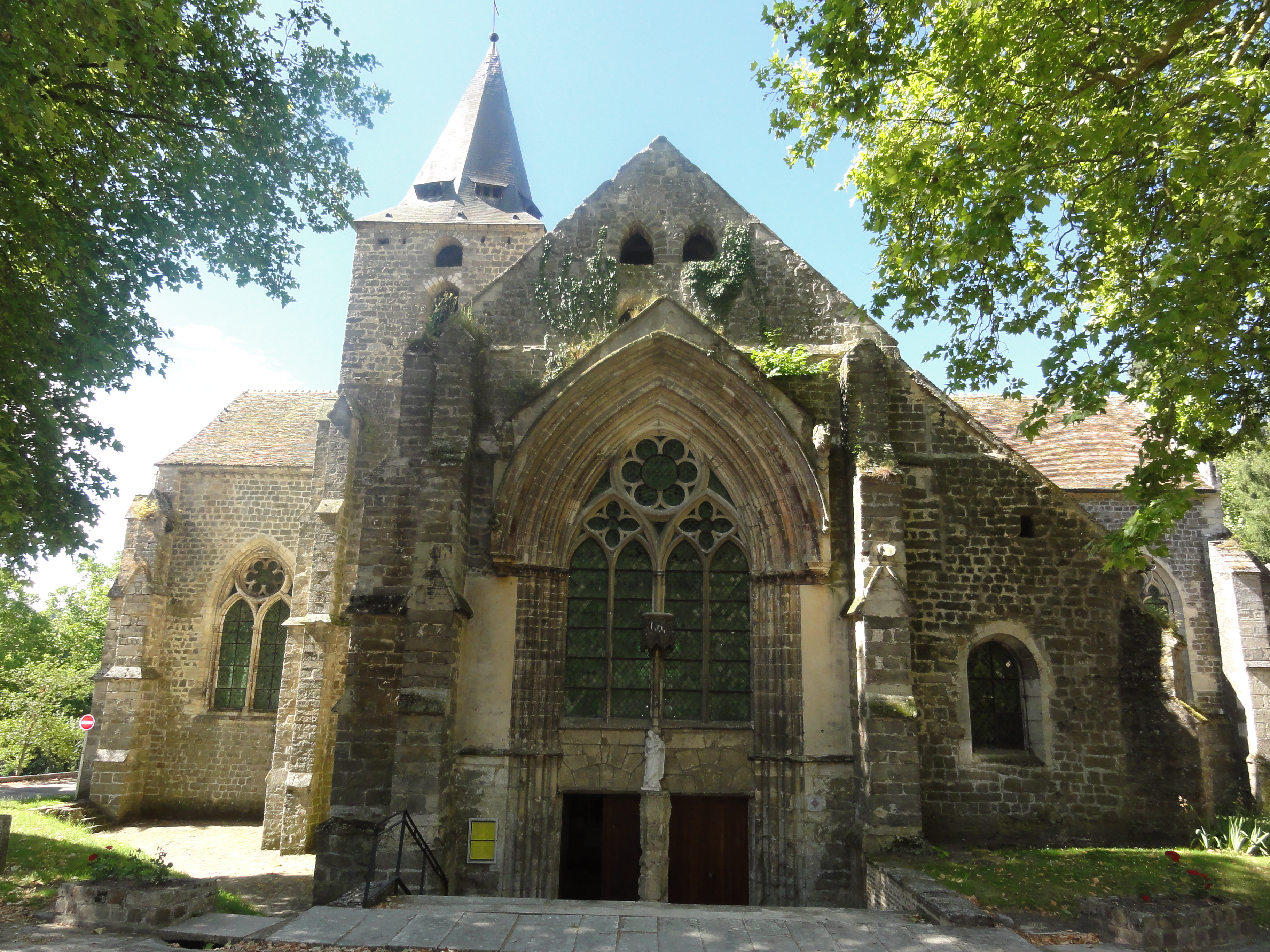 Montaigu (Aisne) Église Saint-Jean-Baptiste